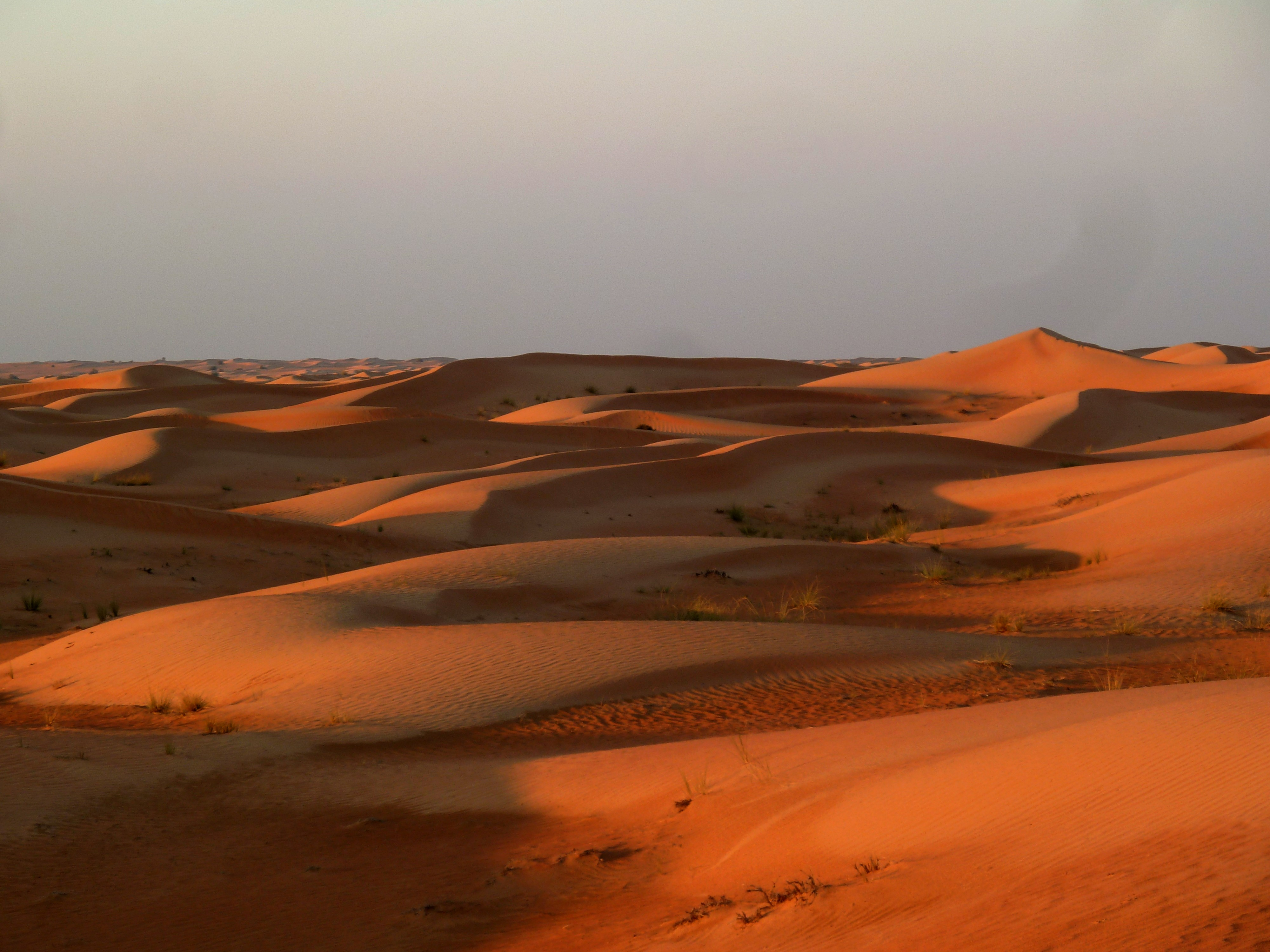 Dubai - lonely desert - الصحراء وحيدا